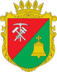 Герб Здолбунівського району